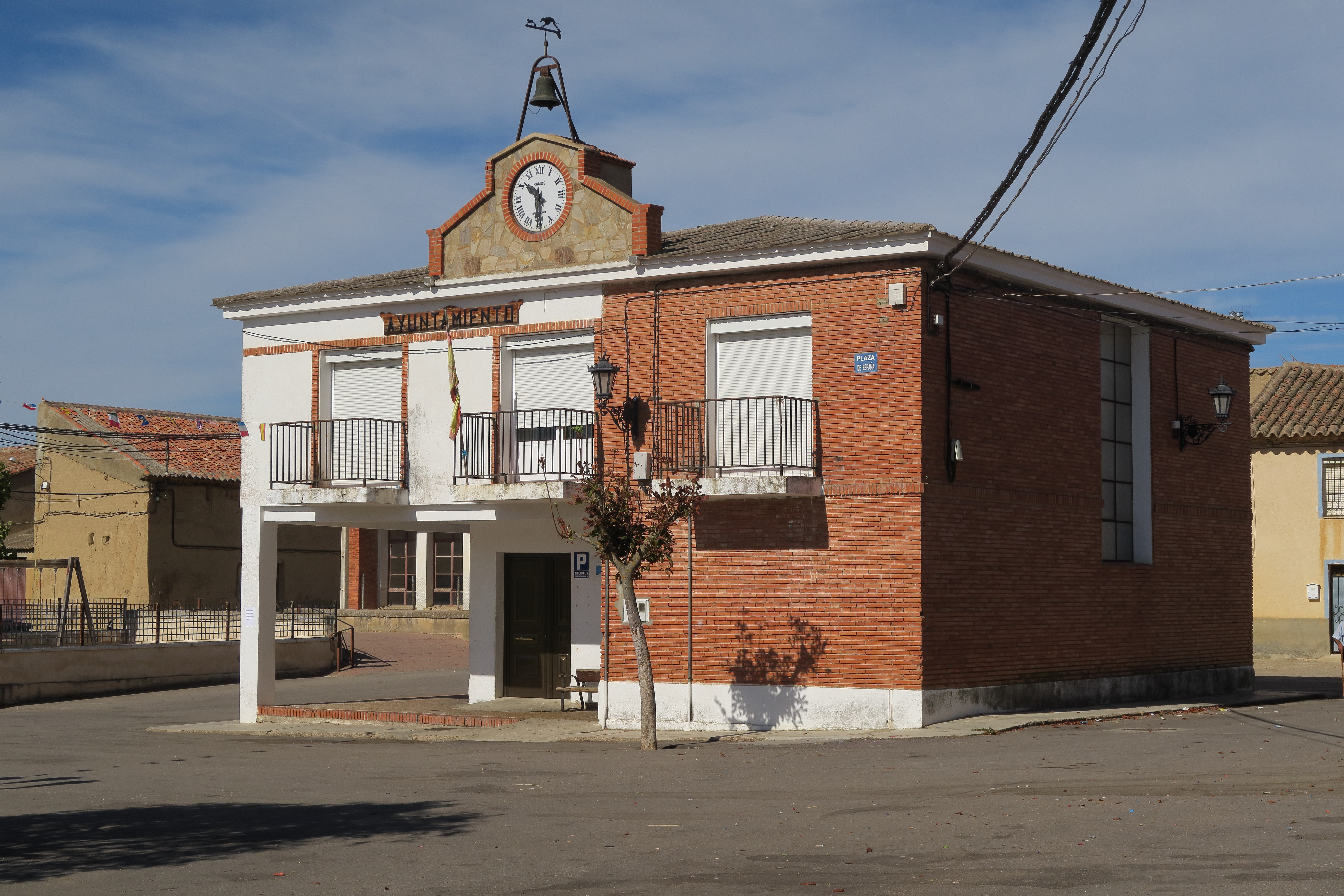 Villarrín de Campos, Ayuntamiento